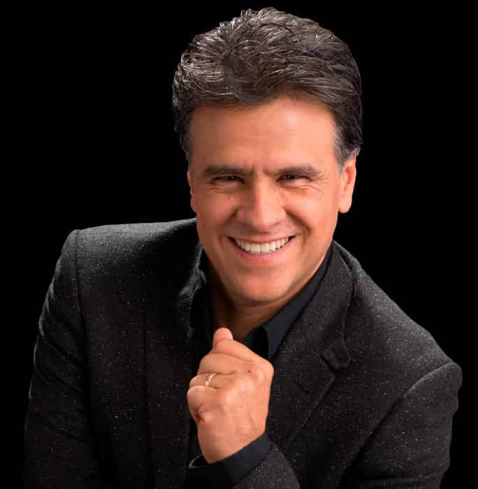 Escritor mexicano